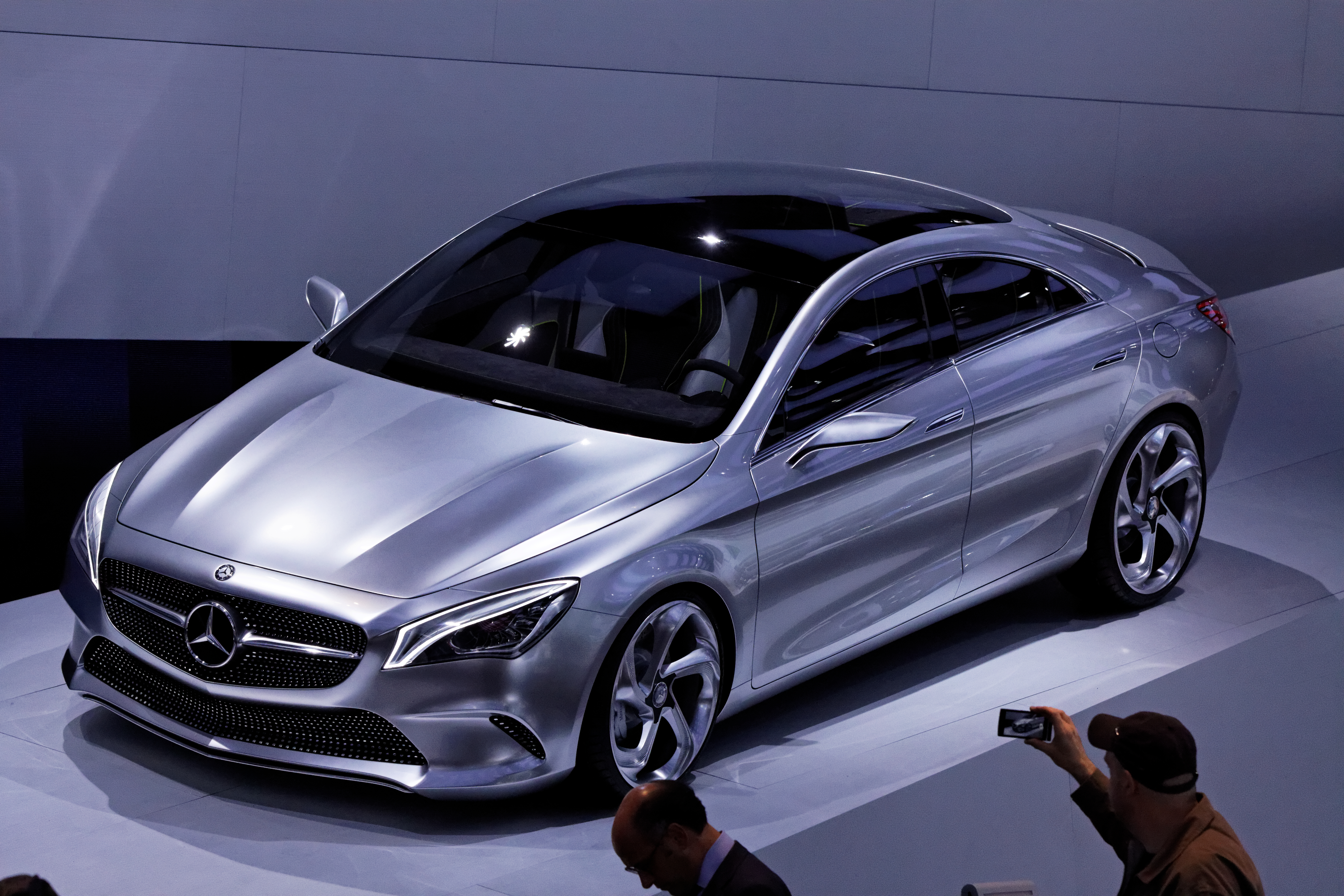 Une Mercedes Concept Style Coupé présentée lors du Mondial de l'automobile de Paris 2012.